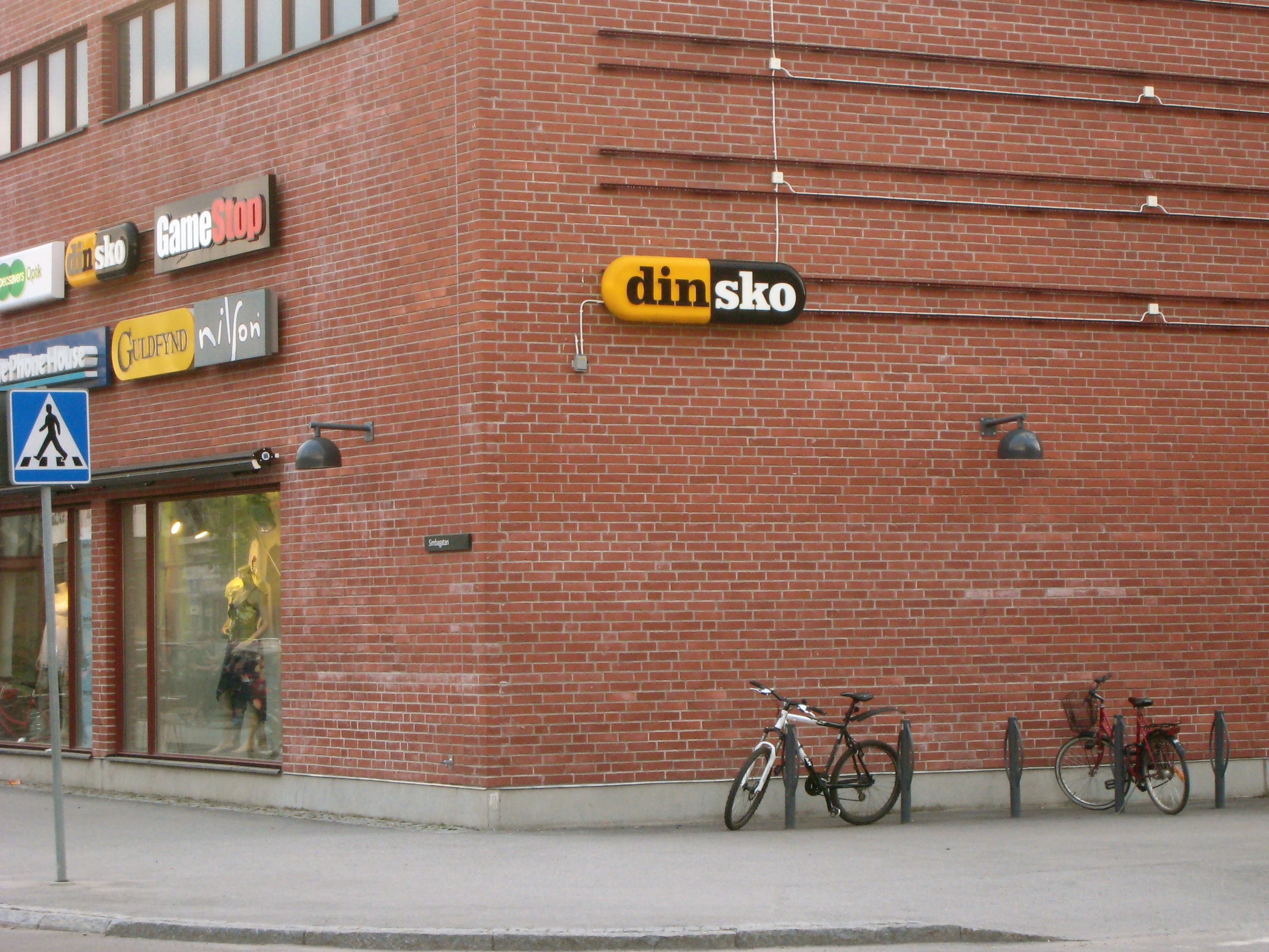 Reklamskylt för Din sko i Sickla.